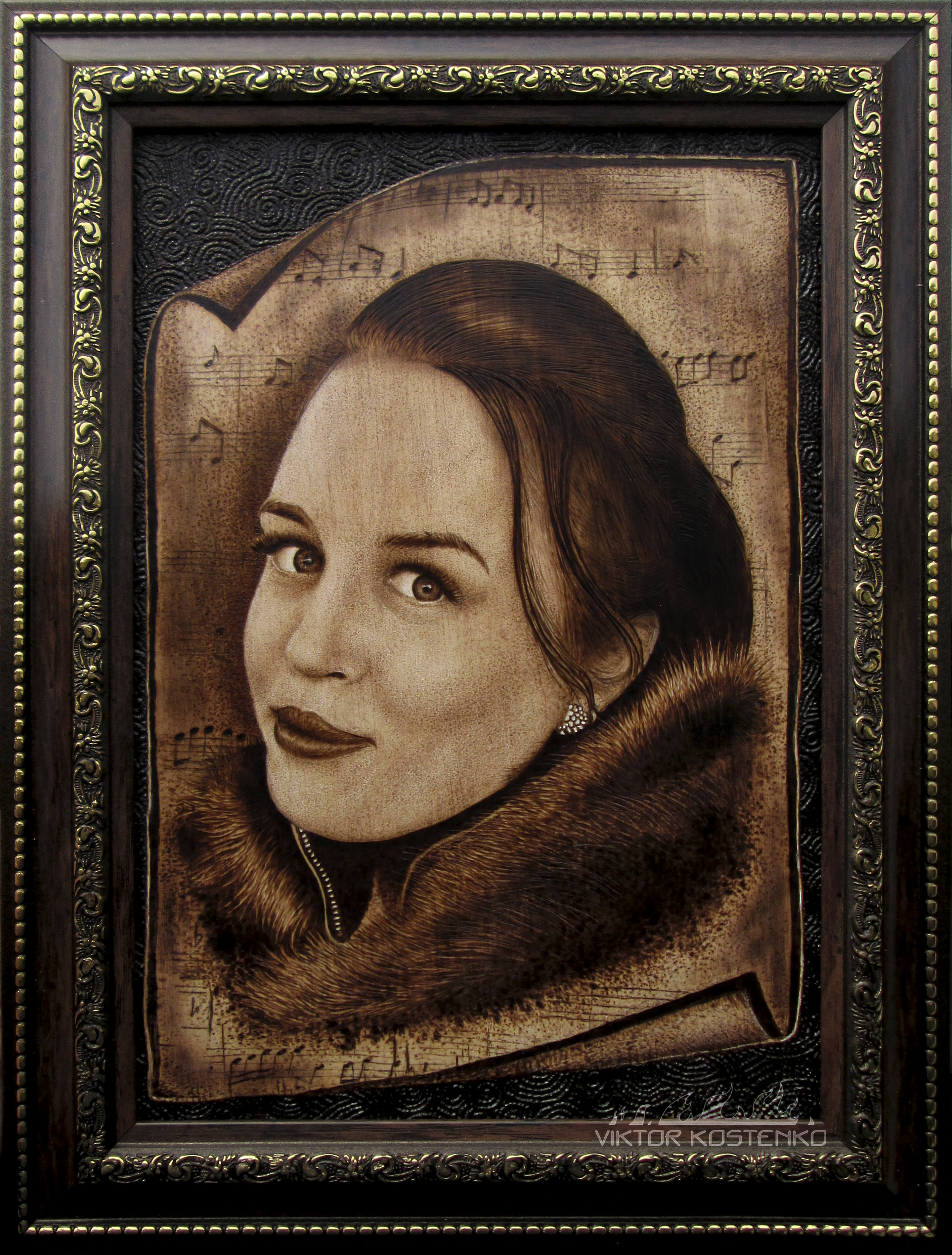 Портрет девушки выполненный выжиганием по дереву в смешанной технике (выжигание контактным пирографом + газовой горелкой)